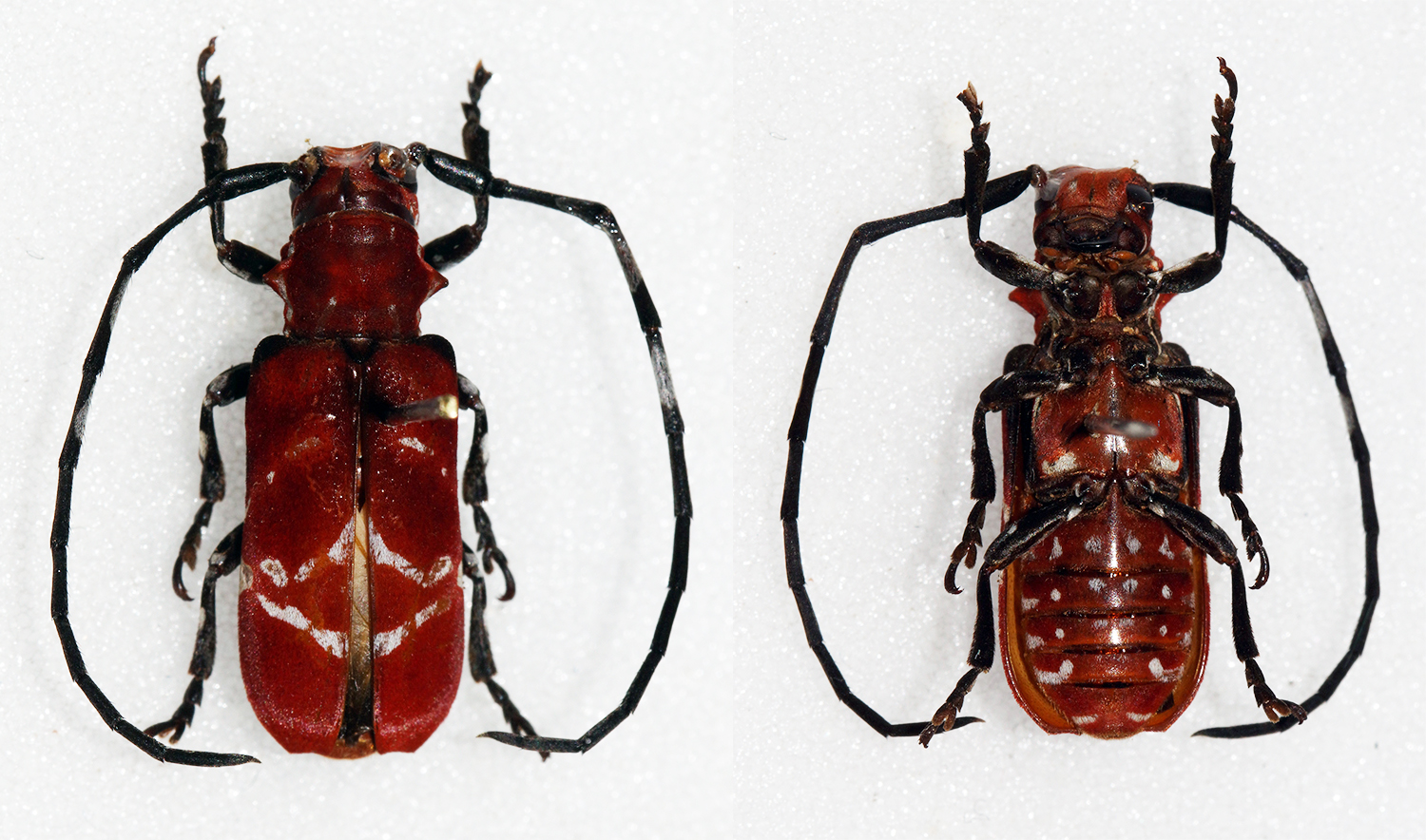 Guérin-Méneville,1844 Sex: Male Data: 02-2011 - Male - Madagascar Size: 16mm